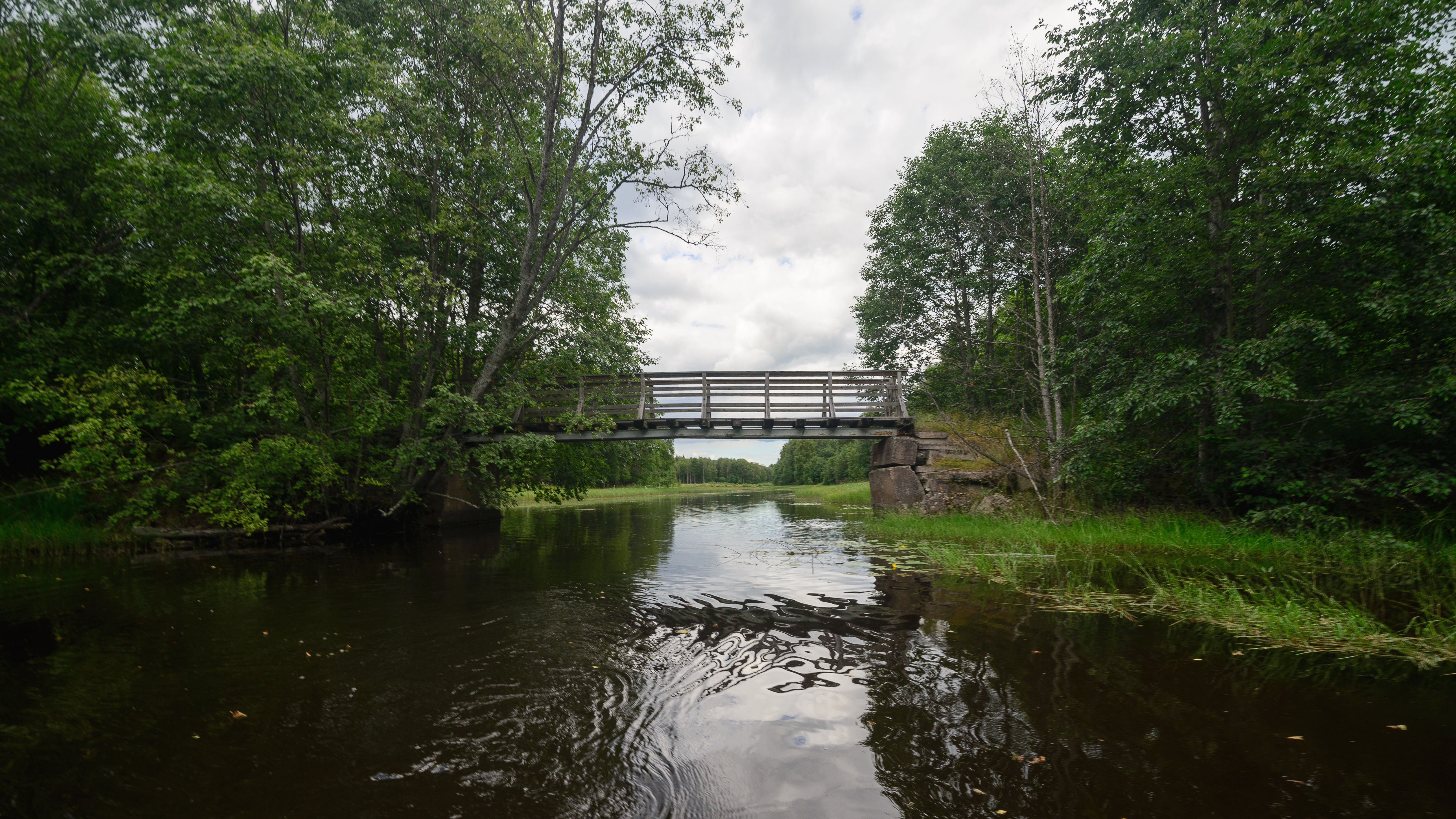 River Helgån and Hundhagen nature reserve in Leksand Municipality.